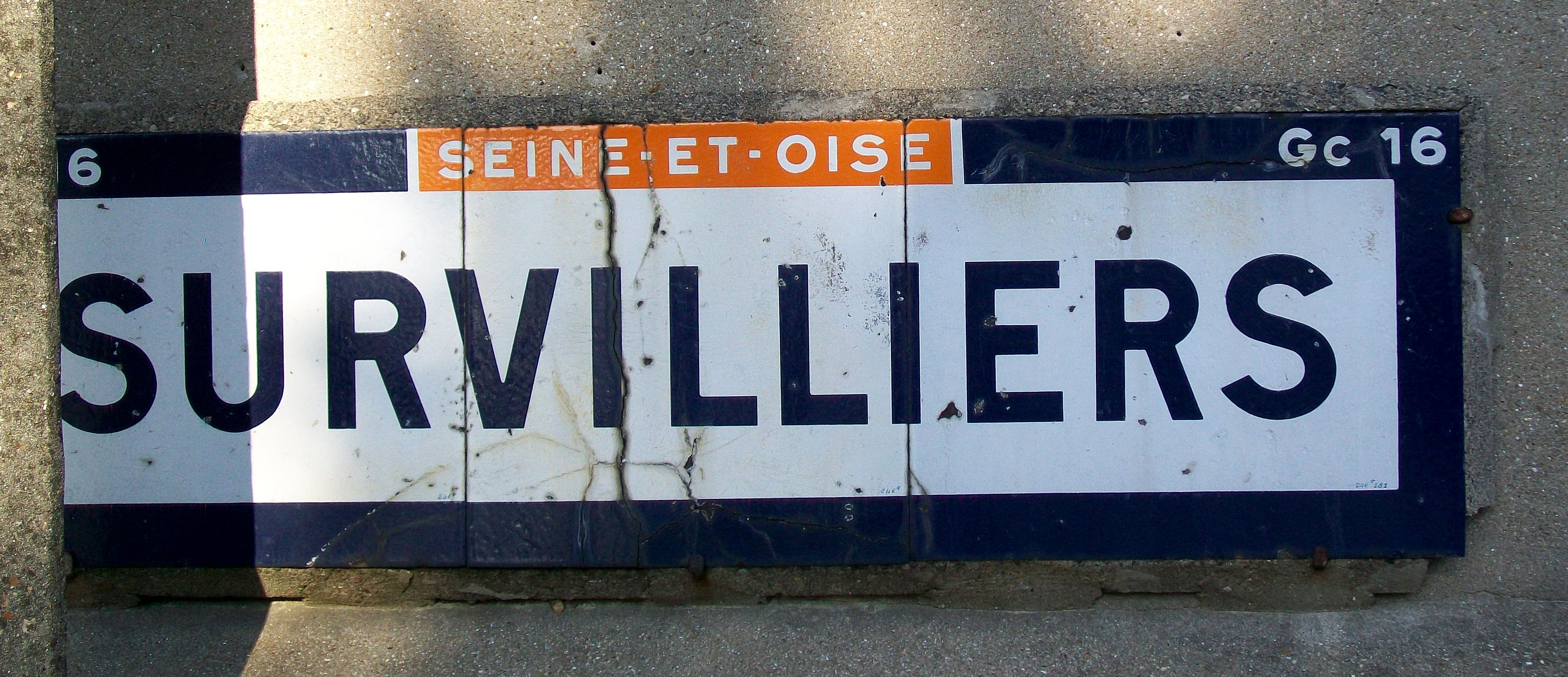 Plaque Michelin à l'entrée sud de Survilliers, en face du musée de la Cartoucherie: elle rappelle encore en 2010 l'appartenance de la commune à l'ancien département de la Seine-et-Oise, 42 ans après sa disparition.